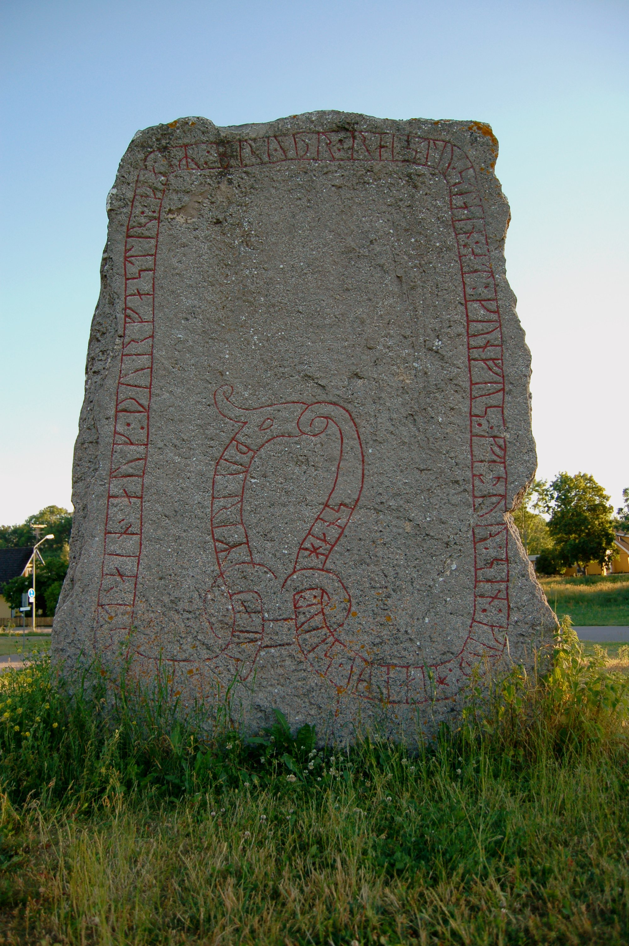 Tingsflisan (Öl 46), Köpingsvik, Borgholms kommun, Öland, Kalmar län, Sverige.